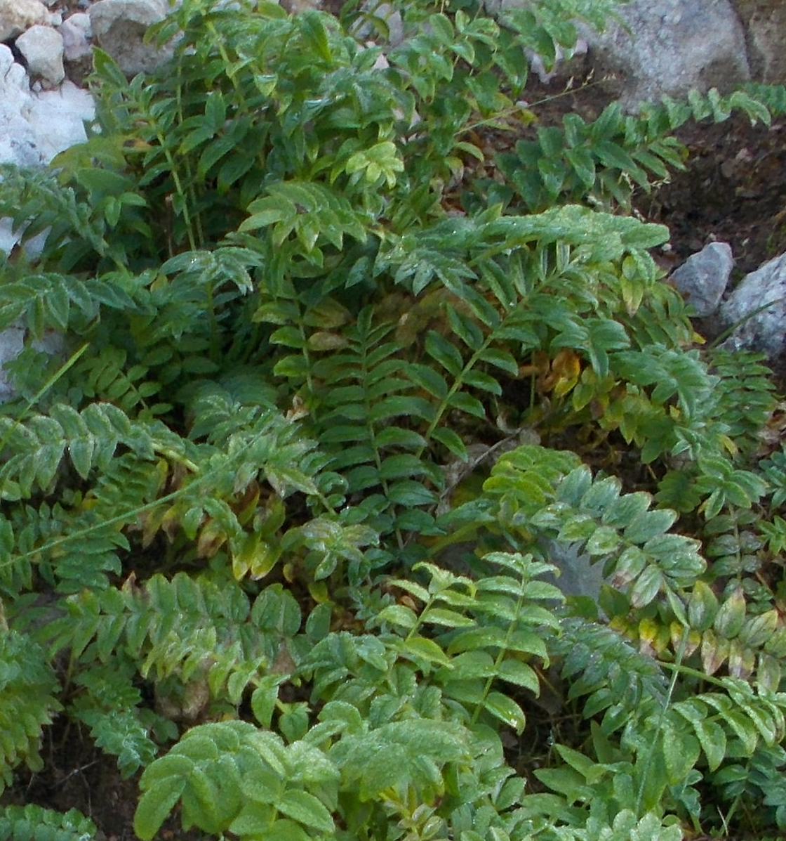 Polemonium caeruleum - Giardino Botanico Alpino delle Viote (Trento) - settembre 2016